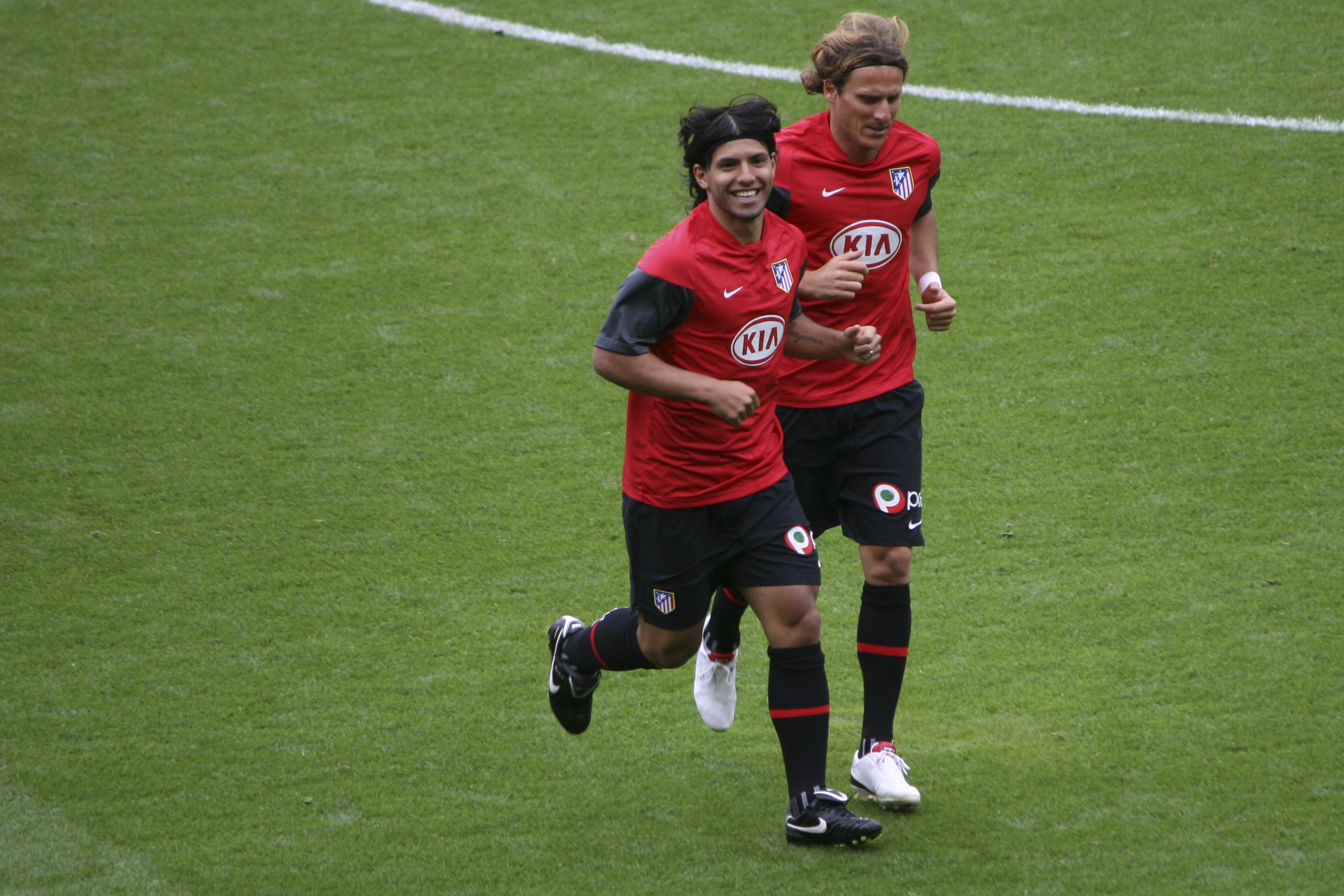 Arsenal Vs. Atlético Madrid Emirates Cup 2009, Emirates Stadium Sergio Agüero & Diego Forlán Training